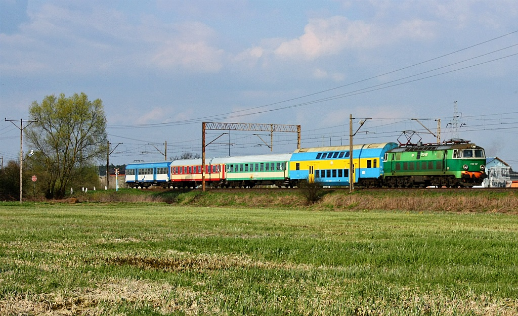 Czempiń - Iłowiec